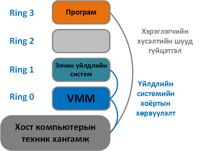 Монгол: Хоёртын хөрвүүлэлтийн арга